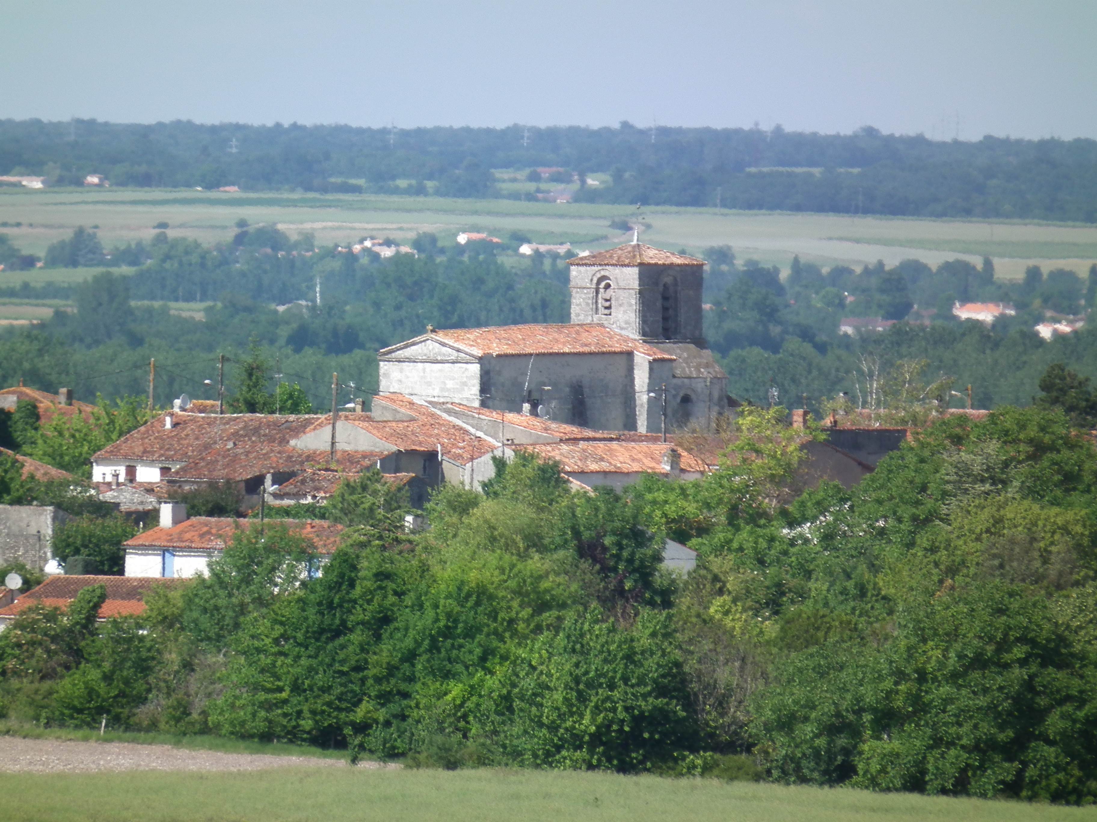 Vue générale du village de La Jard